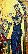 Queen Melisende of Jerusalem